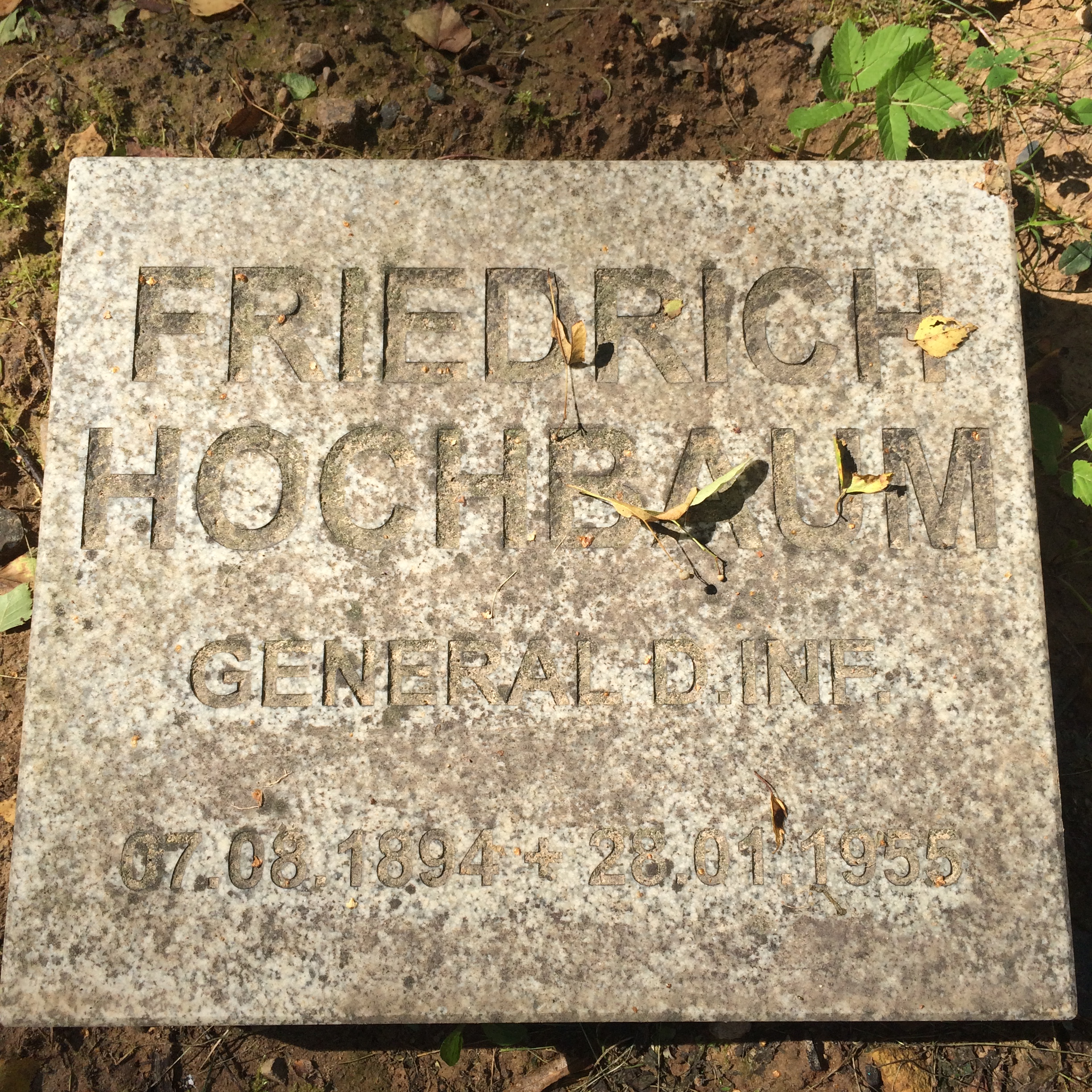 Tombstone; Cherntsy Memorial